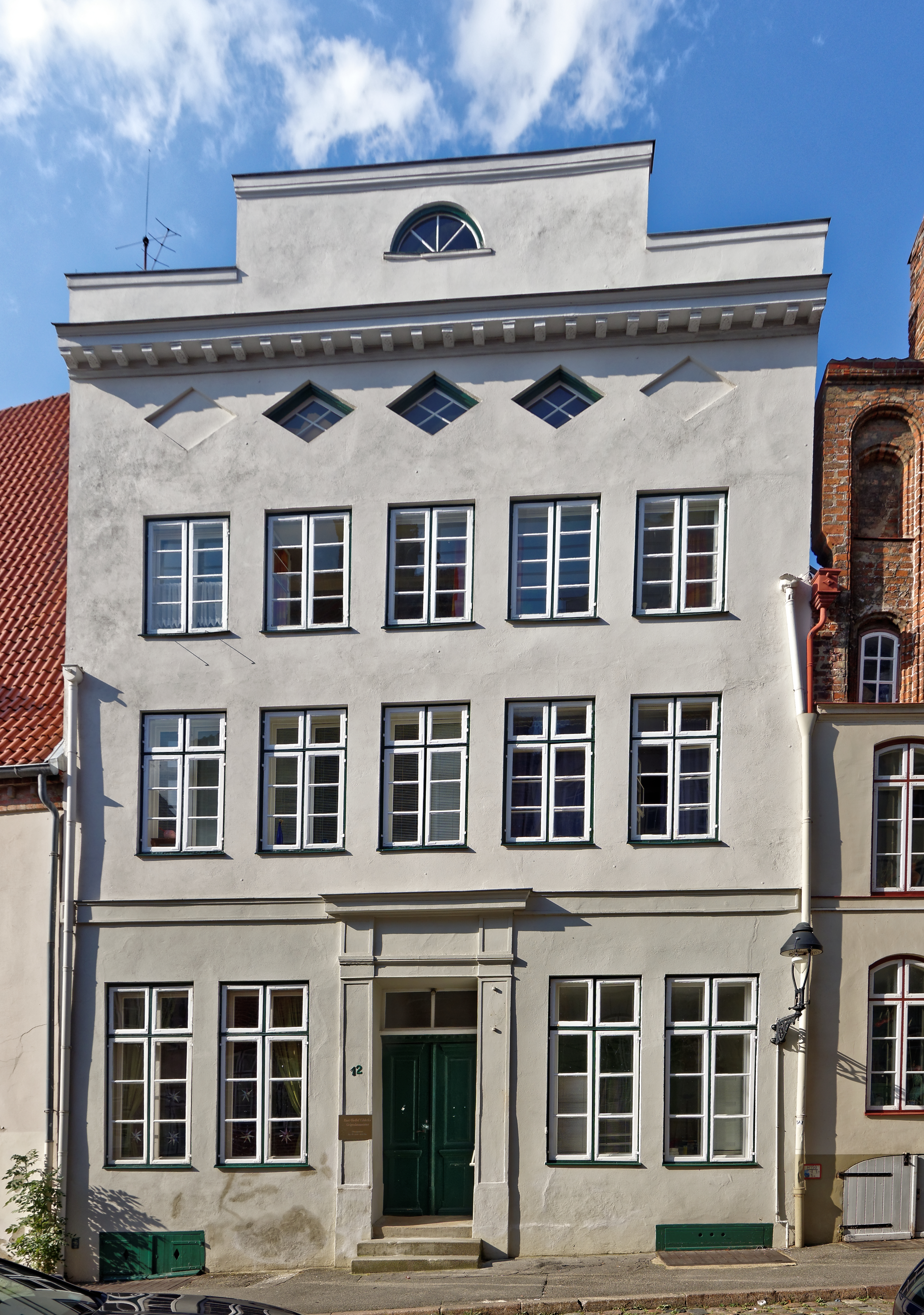 Lübecker Altstadt, Große Petersgrube 12